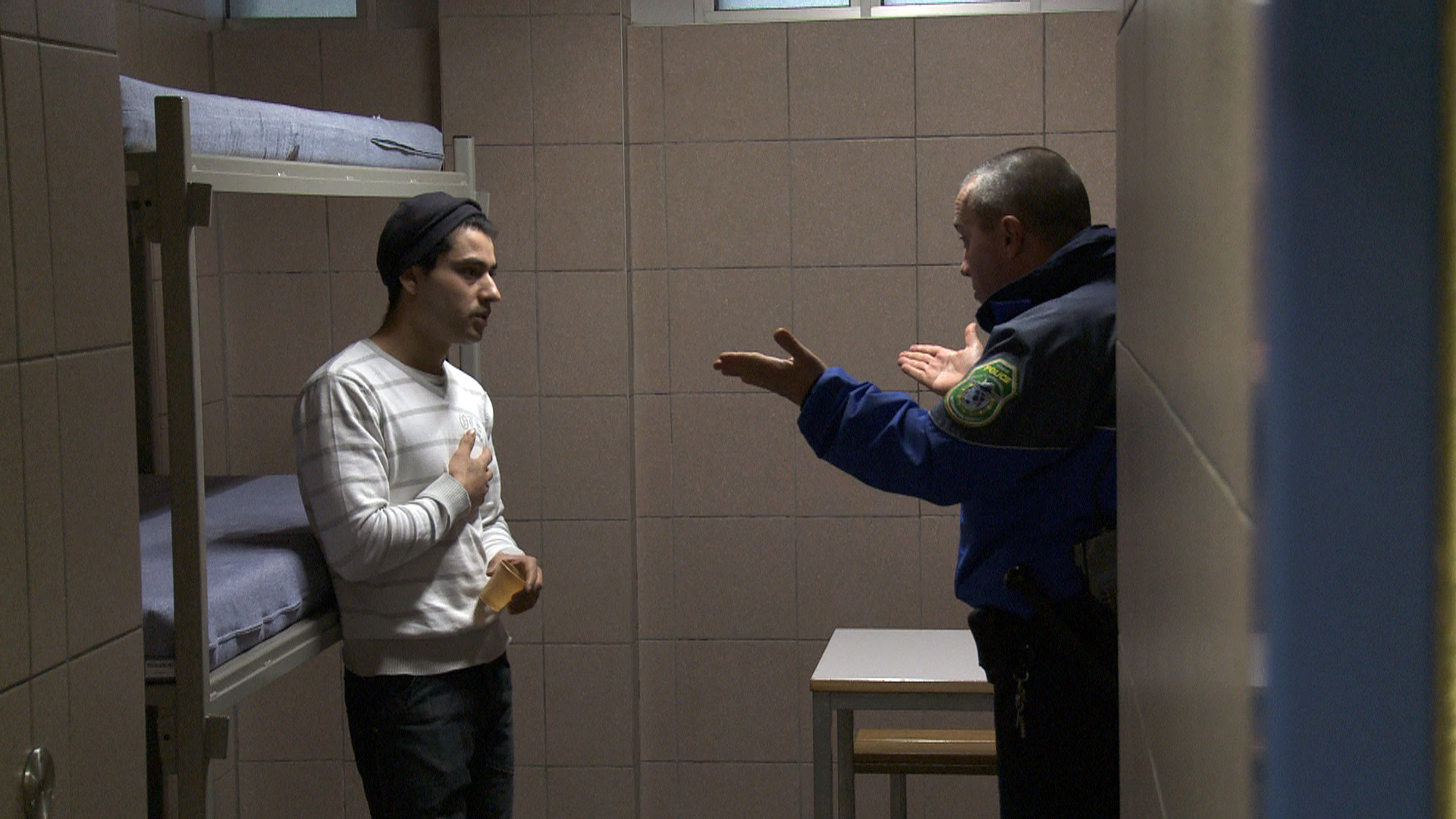 Jeton, protagoniste du film « Vol Spécial » de Fernand Melgar, s’oppose à son renvoi dans la cellule de la police de l’aéroport.